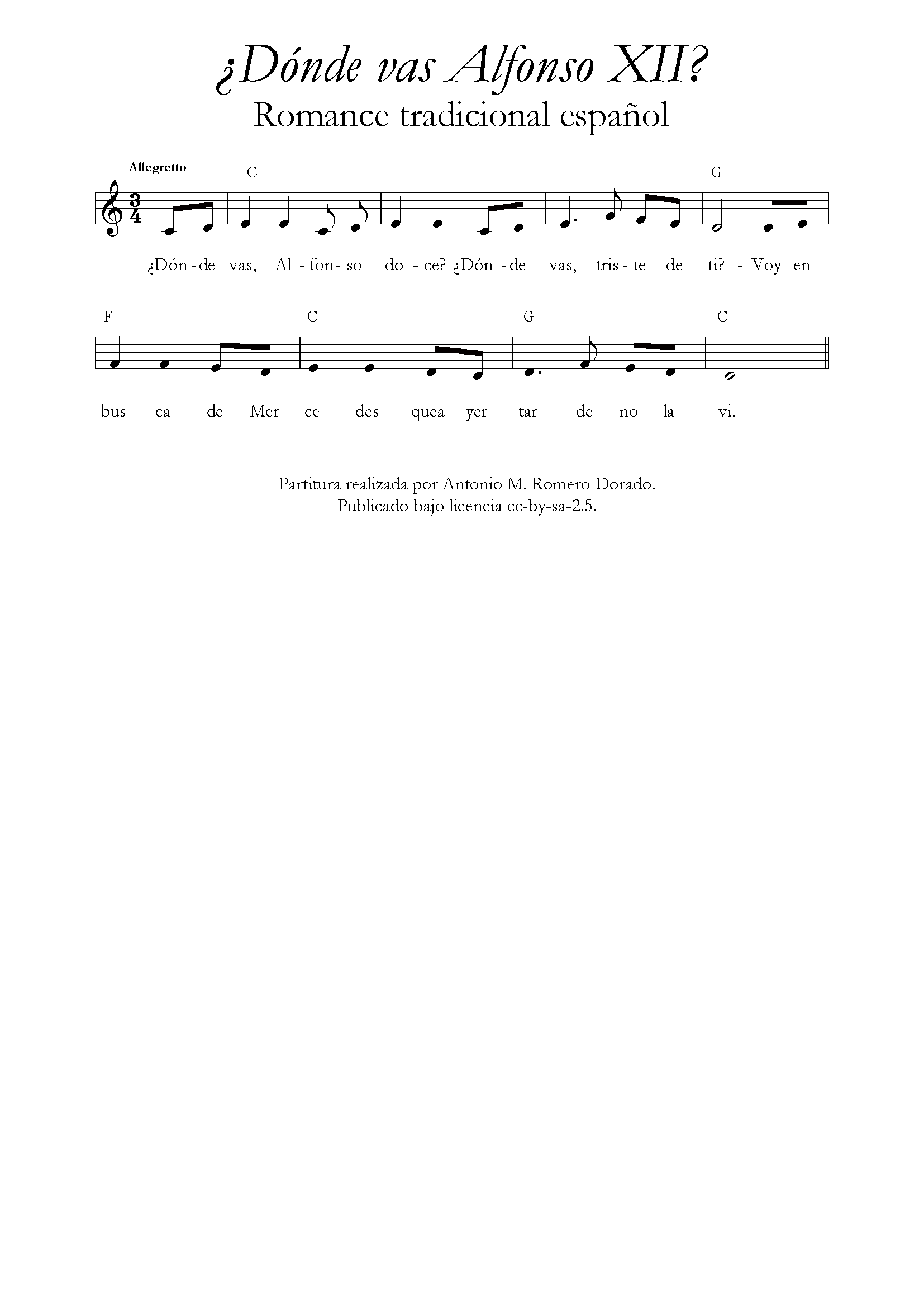 ¿Adónde vas Alfonso XII? (romance tradicional español)